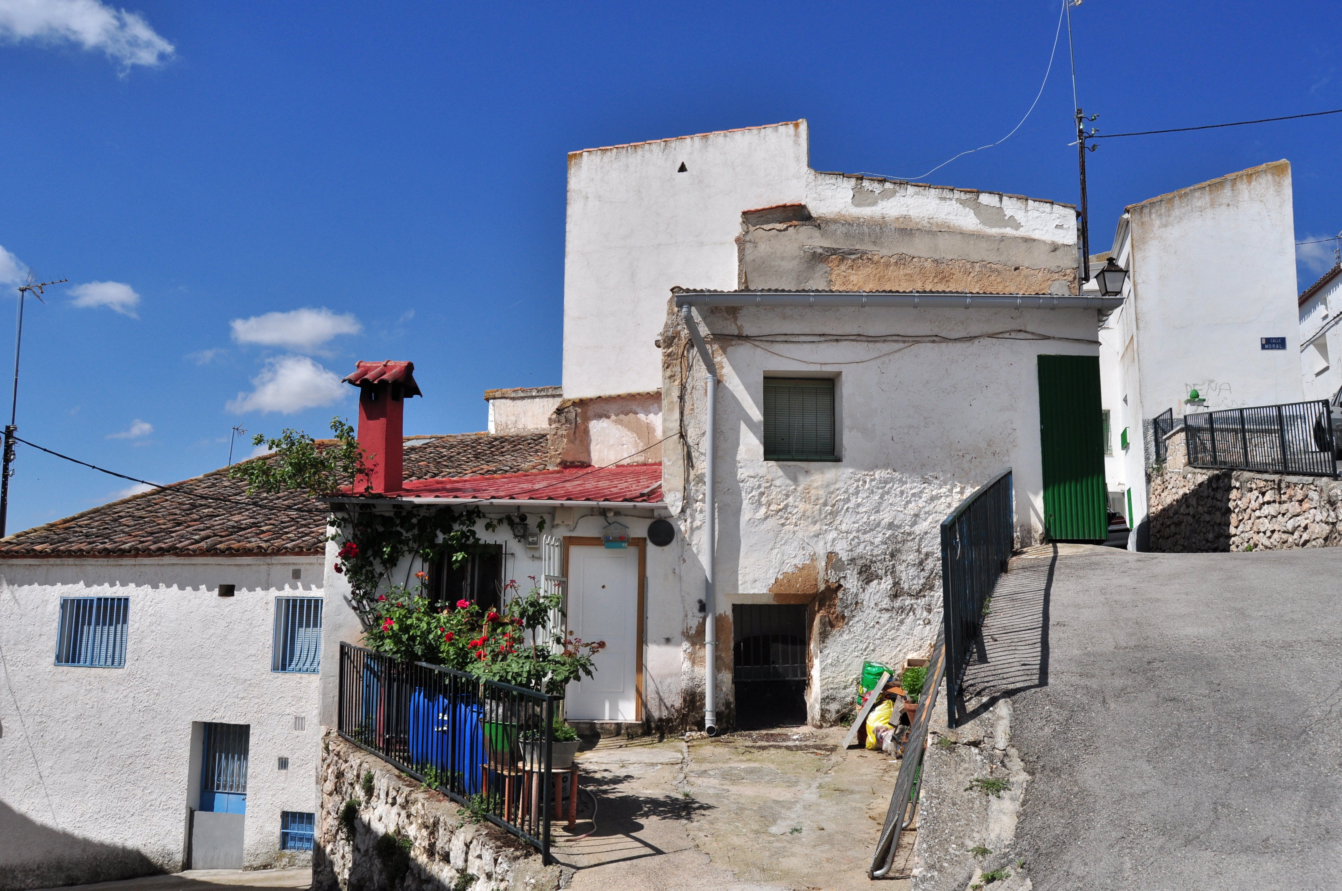 Orusco de Tajuña - 005